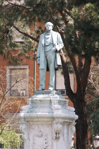 Monumento al marqués de Salamanca en la plaza homónima de Madrid, España. Escultor: Jeronimo Suñol.